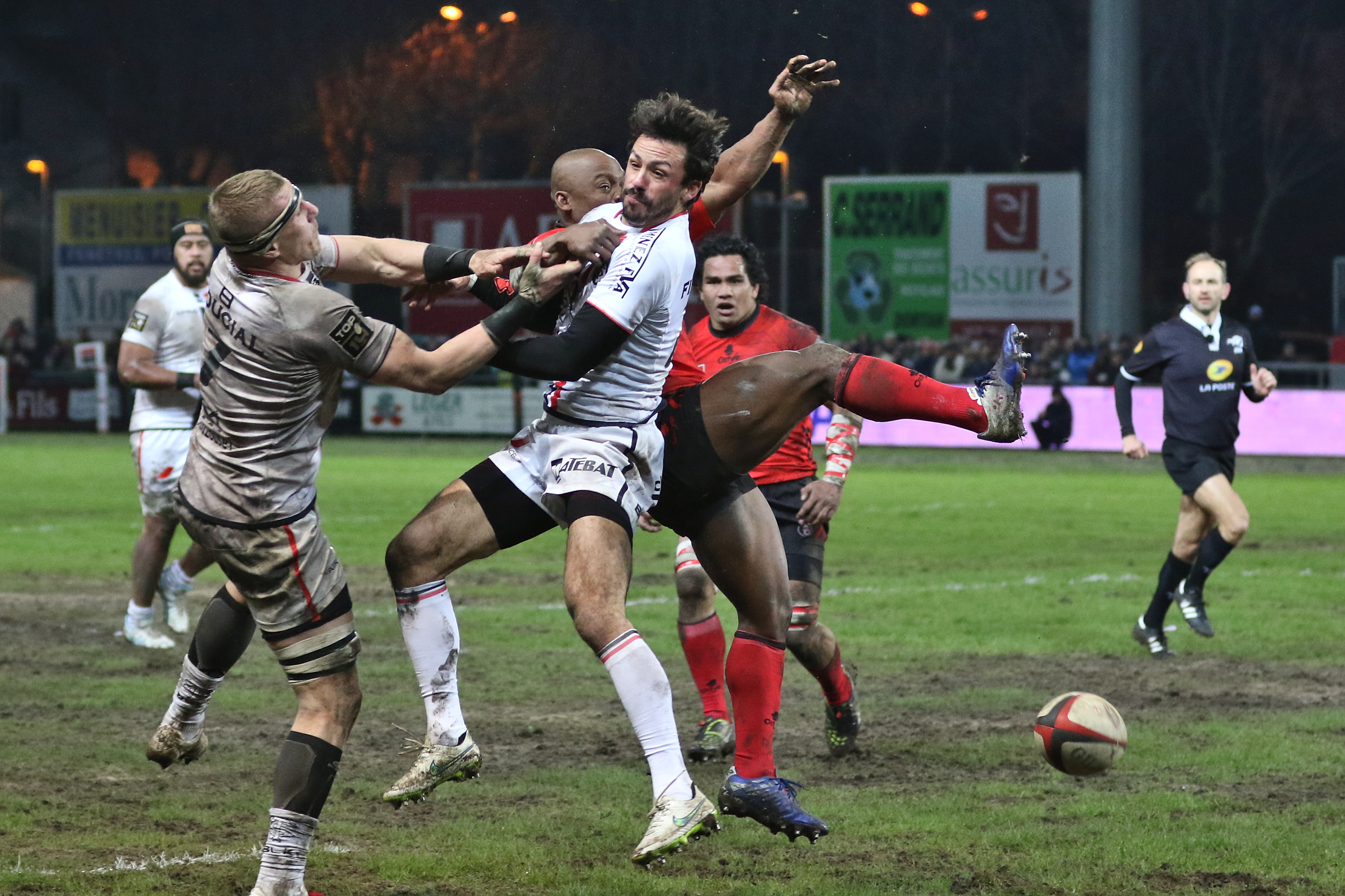 USO-ST - 20150306 - Réception de chandelle